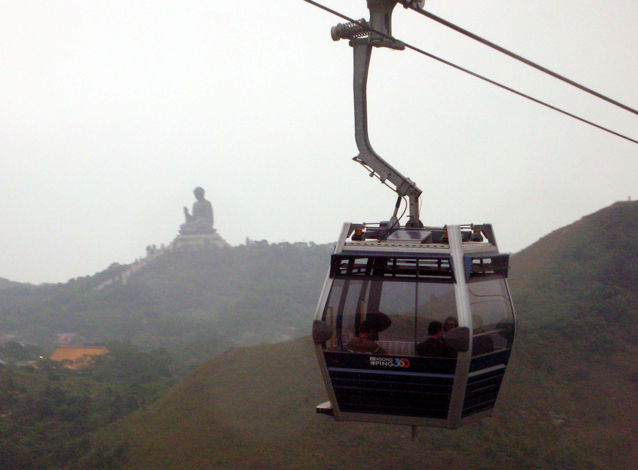 Ngong Ping 360 (Cable car)and Tian Tan Buddha, Hong Kong 昂坪360纜車與天壇大佛，左下方燈色瓦頂為寶蓮禪寺。